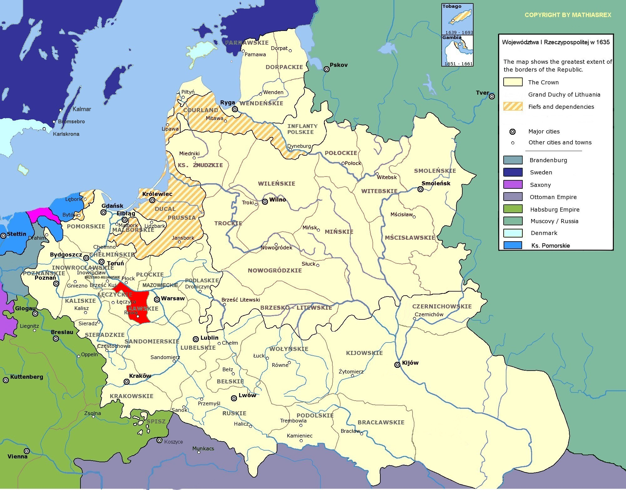 województwo rawskie I Rzeczypospolitej A modified copy of Image:Rzeczpospolita voivodships.png by Halibutt